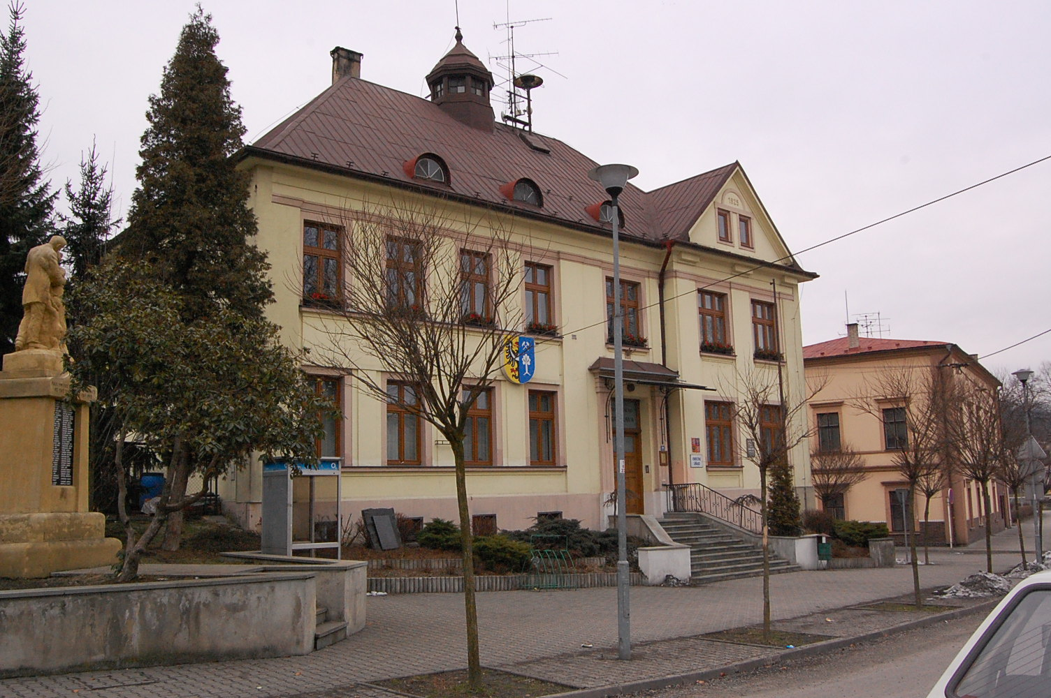 Doubrava (Karviná) zleva : památník obětem 1.sv. války, radnice a bývalá hospoda "U Franka" dnes pana Konečného. Hospoda "U Franka" roce 1875 byla nízká budova s jednou třídou, kde se vyučovalo v českém jazyce. Tato budova byla upravena a kromě školy zde byly byty pro učitele a obecní kanceláře.